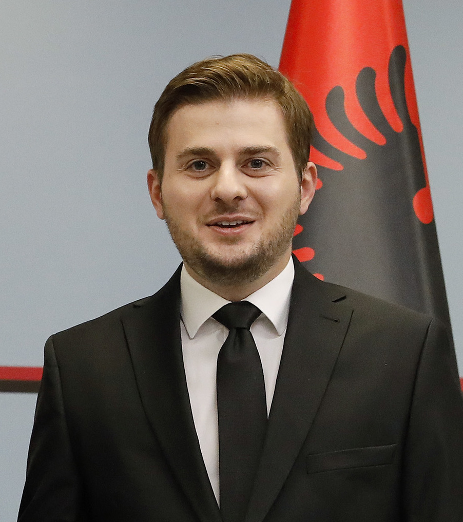 Arbeitsbesuch Albanien. BM Alexander Schallenberg trifft den albaischen Außenminister Gent Cakaj. 08.10.2019, Foto: Dragan Tatic